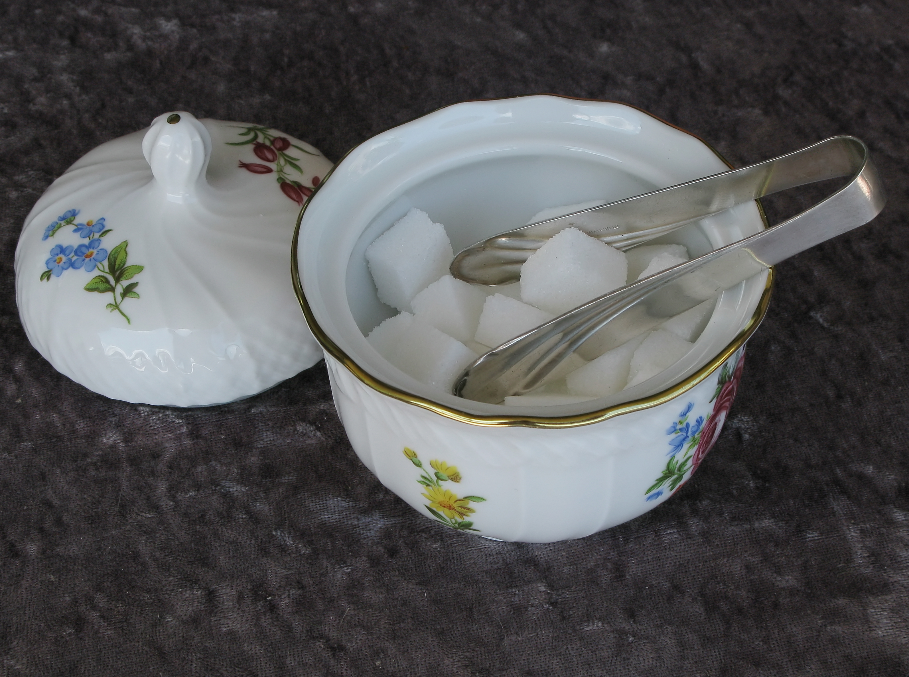 Zuckerzange zum Greifen von Würfelzucker